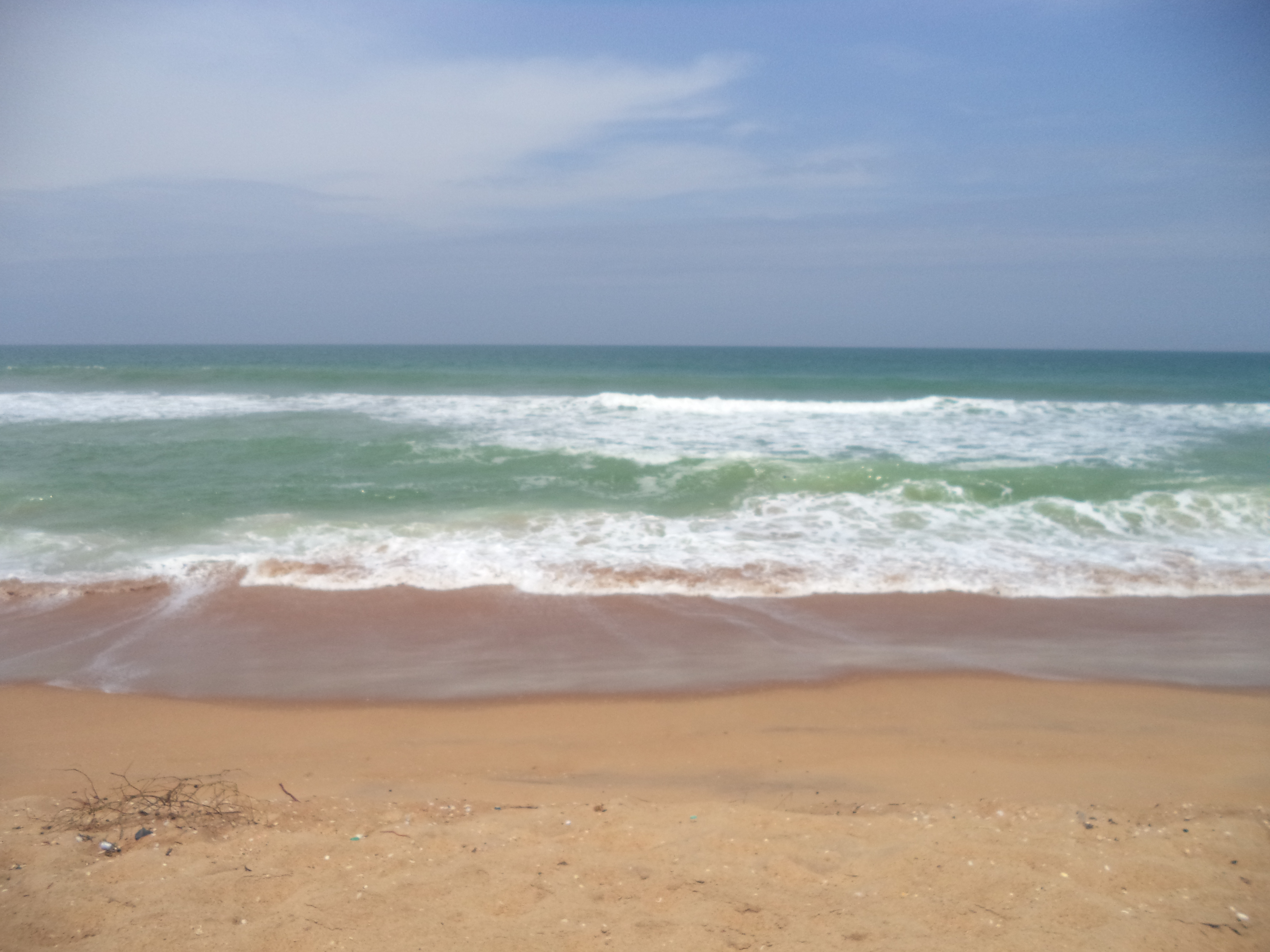 la cote de la mer à agoué.